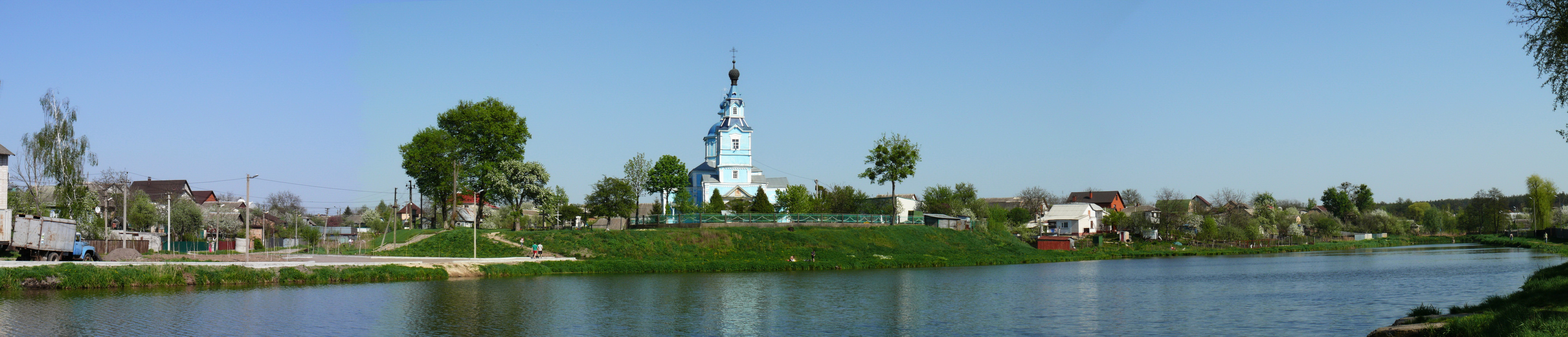 Свято-Михайловская церковь на Будаевском городище времен Киевской Руси.